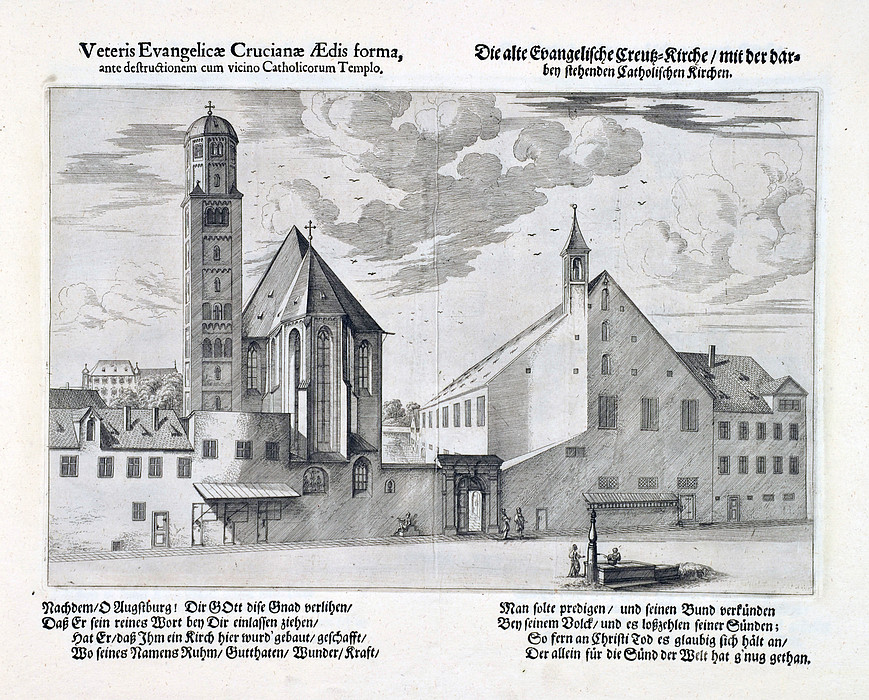 Die alte Evangelische Creutz-Kirche mit der darbey stehenden Catholischen Kirchen, aus: J. J. Kraus: Ichnographicae atque scenographicae delineationes templi Cruciani Evangelici Augustani. Das ist: Wahre und eigentliche Abbildung der alten Evangelischen Kirchen zum H. Creutz in Augsburg ..., wie auch der heutigen auf den alten Platz weit herrlicher und schöner neu-erbauten Evangelischen Kirchen. Zum andernmahl aufgelegt und vermehret und von M. S. H. mit wohlgefaßten Versen gezieret. Anjezo aber auf ein neues mit viel Sinnbilder außgezieret worden durch Johann Ulrich Kraußen. Augsburg 1703.